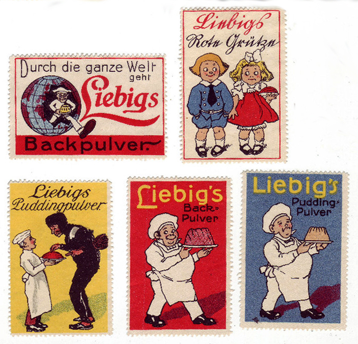 Reklamemarken (englisch: Cinderellas oder poster stamps) von Liebigs Manufactory Meine & Liebig ...